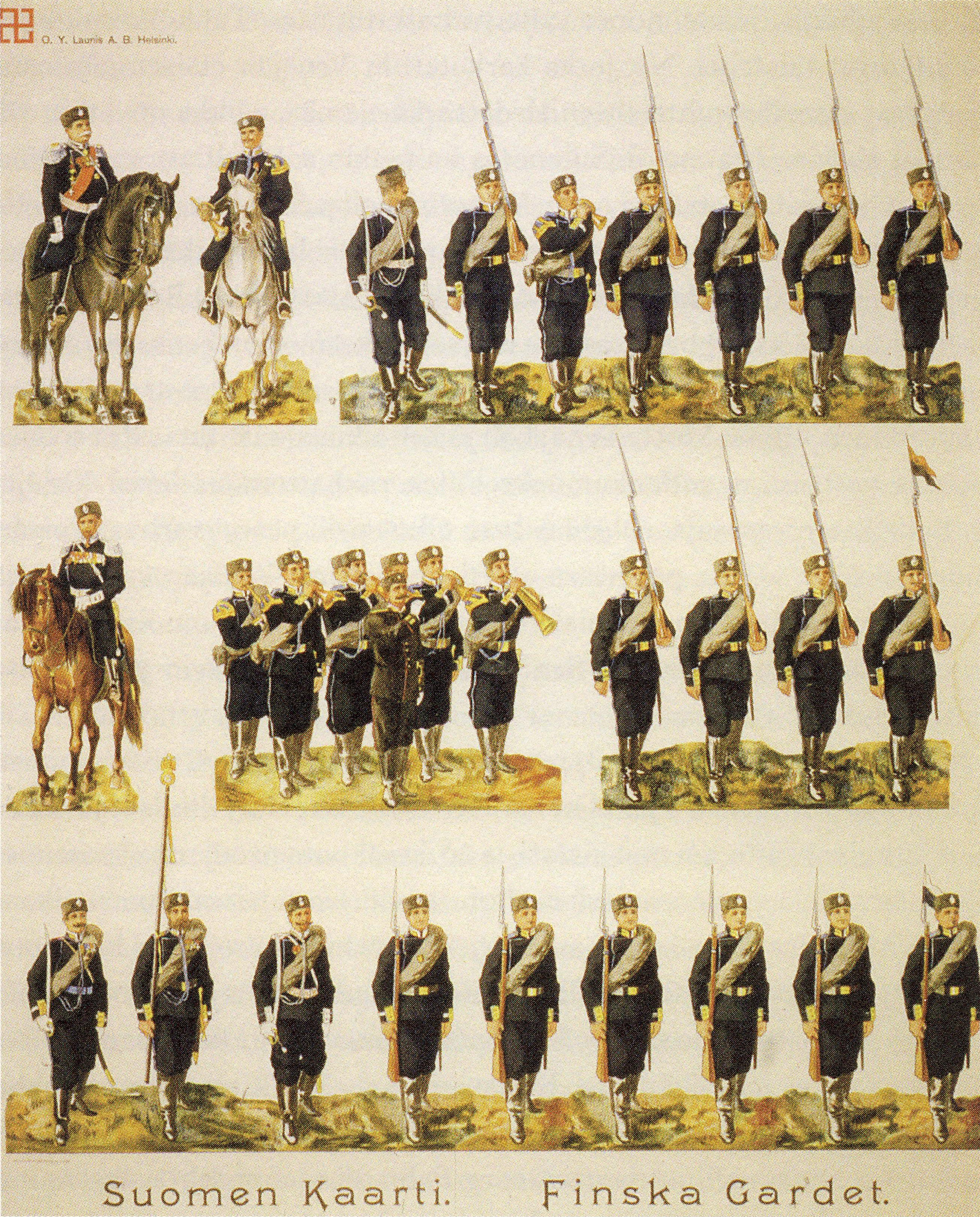 Suomen kaartin lakkauttamisen jälkeen ilmestyneitä kuvapiirroksia kaartin sotilaista ja univormuista.